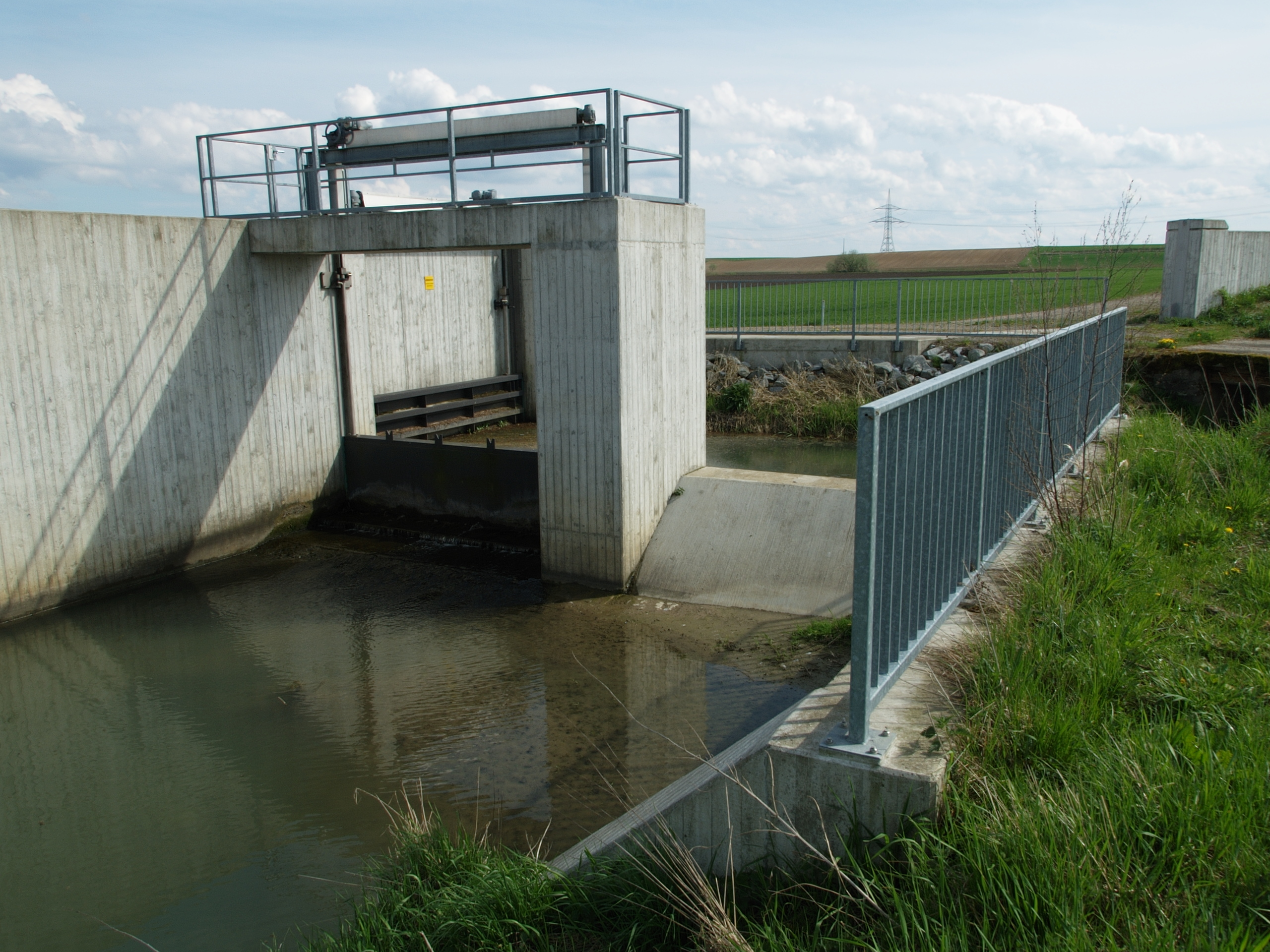 Schütz mit seitlichem Überlaufwehr im Irlbach